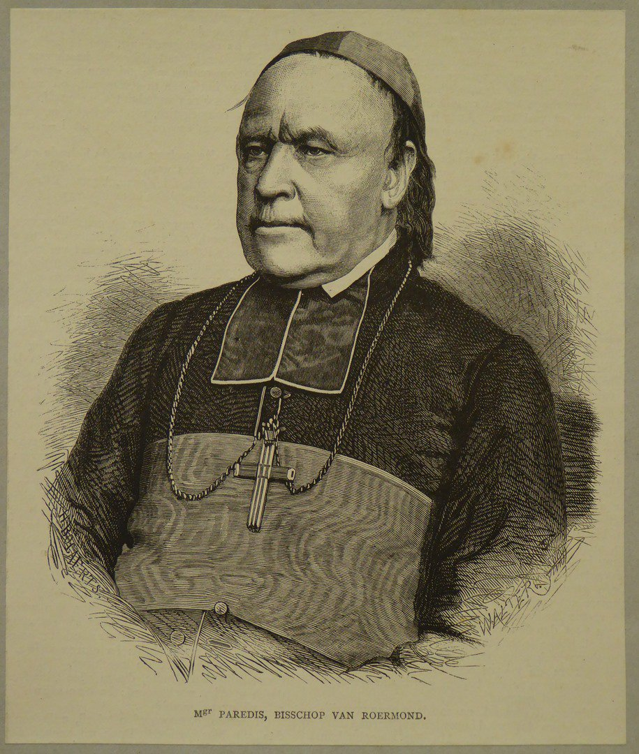 Mgr. J.A. Paredis (1795-1886), gravure J. Walter (coll. Catharijne Convent)